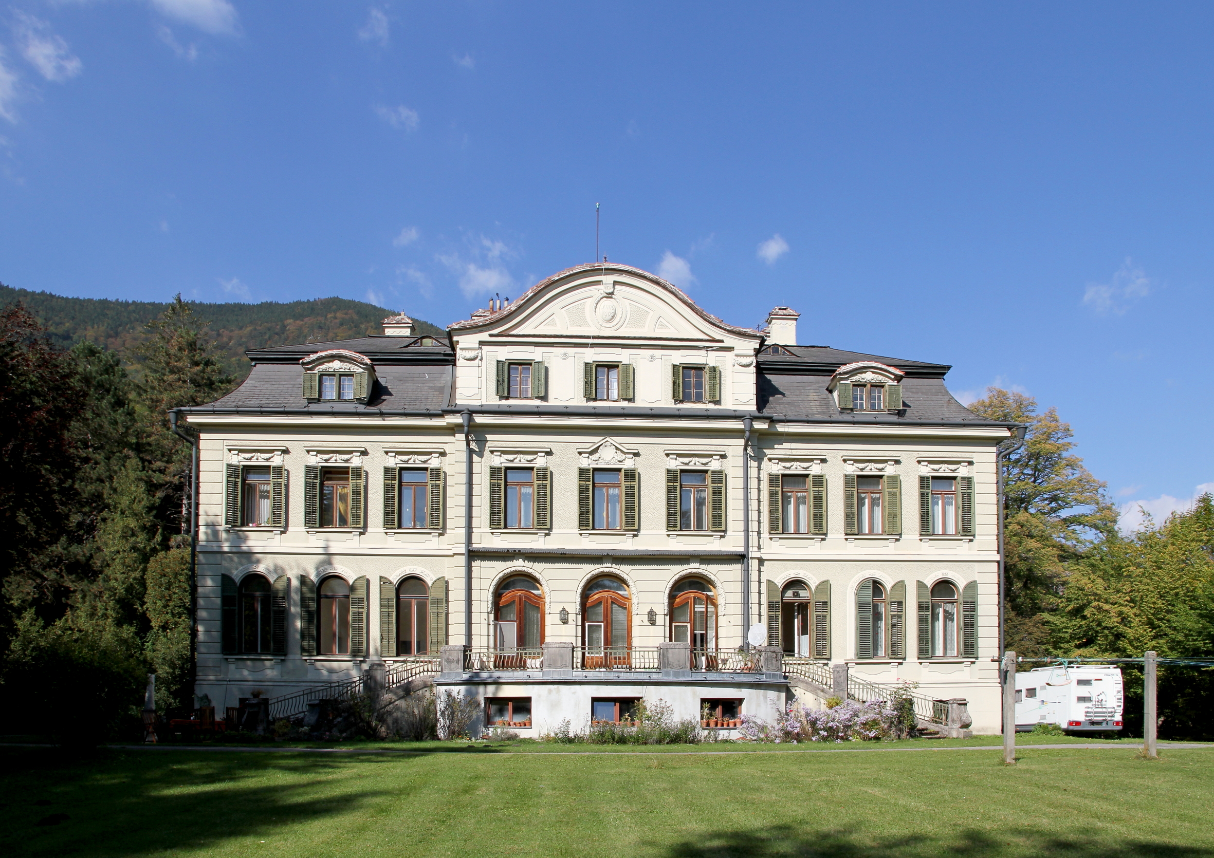 Die Villa Schoeller in Hirschwang, ein Ortsteil der niederösterreichischen Marktgemeinde Reichenau an der Rax. Nach Plänen von Egon von Leutzendorf im Jahr 1905 errichteter repräsentativer kubischer Bau mit neobarocken-klassizierenden Formen.